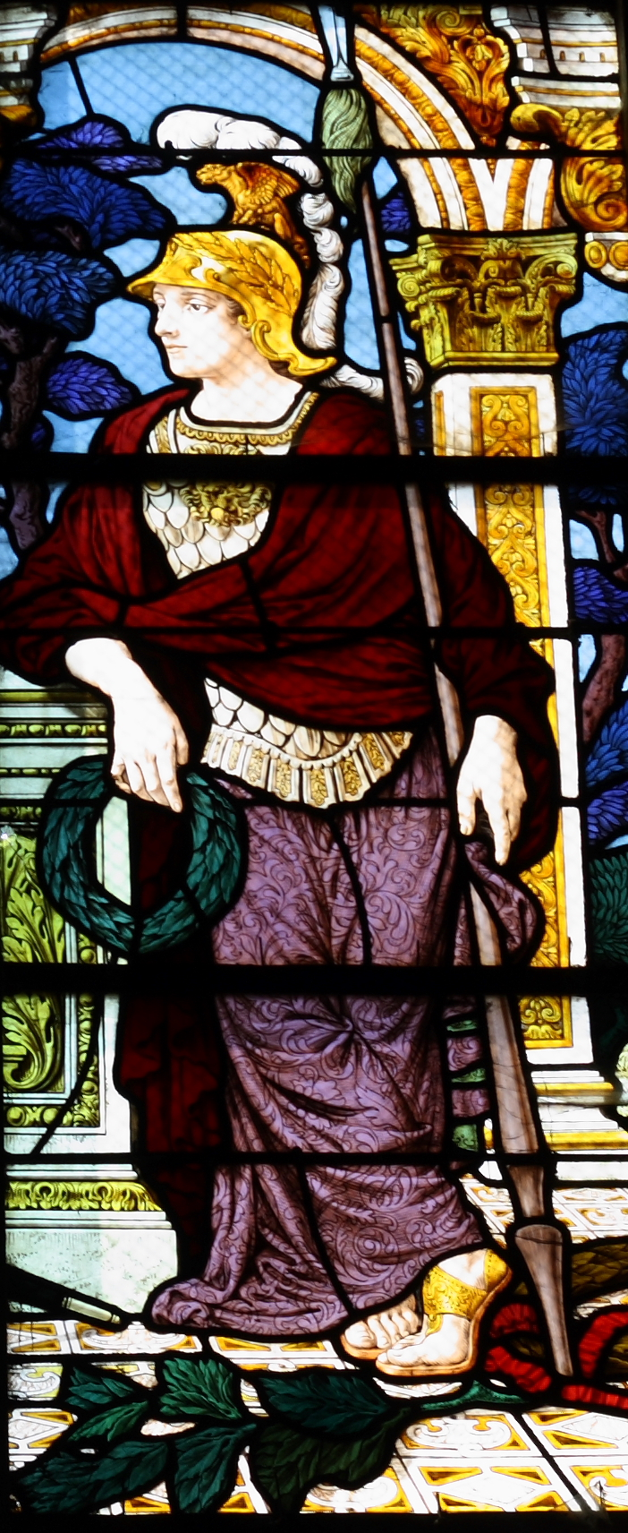 Bleiglasfenster (Ausschnitt) in der katholischen Pfarrkirche Saint-Martin (Collégiale Saint-Martin) in Montmorency, Darstellung: Allegorie von Mut und militärischem Ruhm, Fenster aus dem 19. Jahrhundert